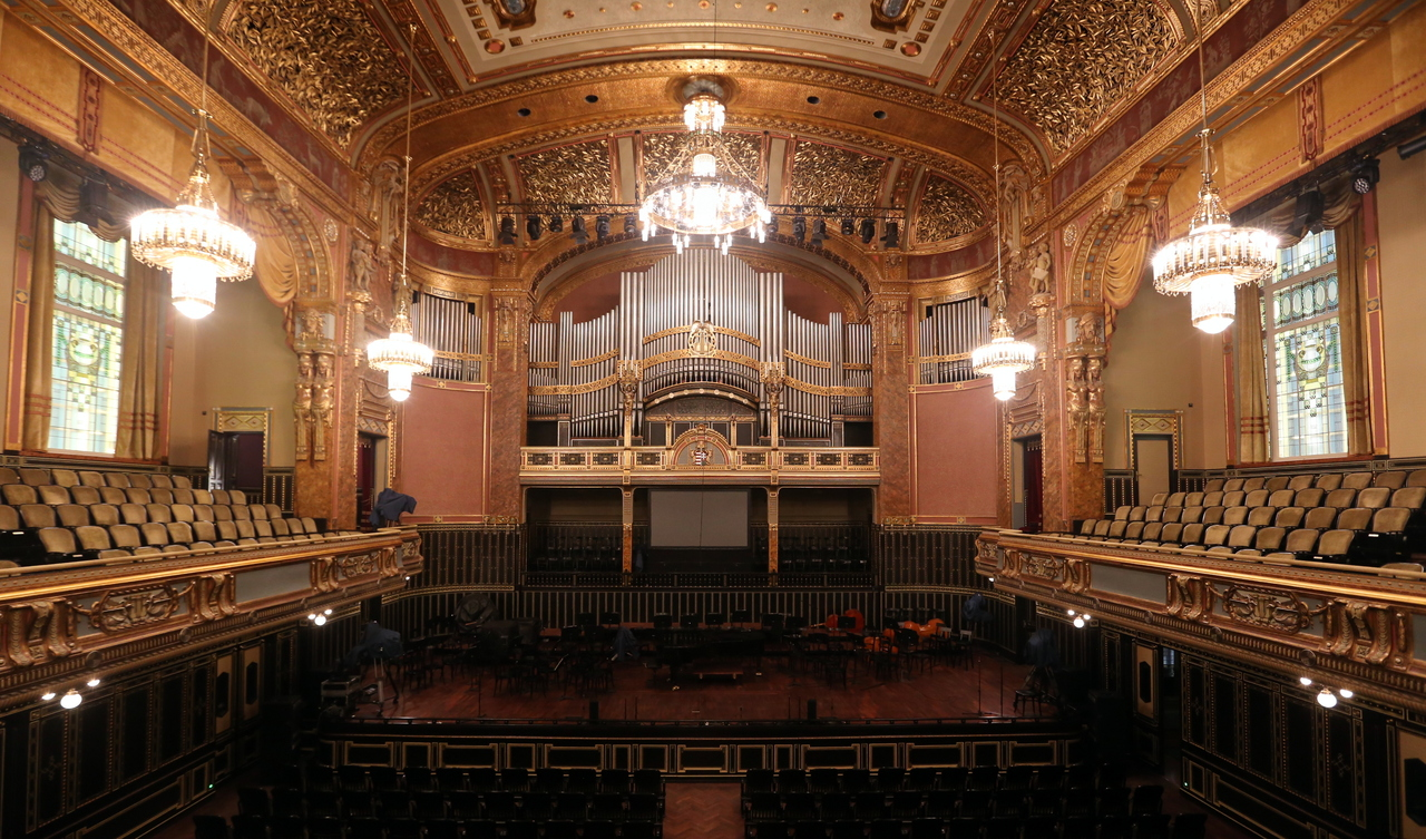 Liszt Ferenc Zeneművészeti Főiskola This is a photo of a monument in Hungary. Identifier: 755